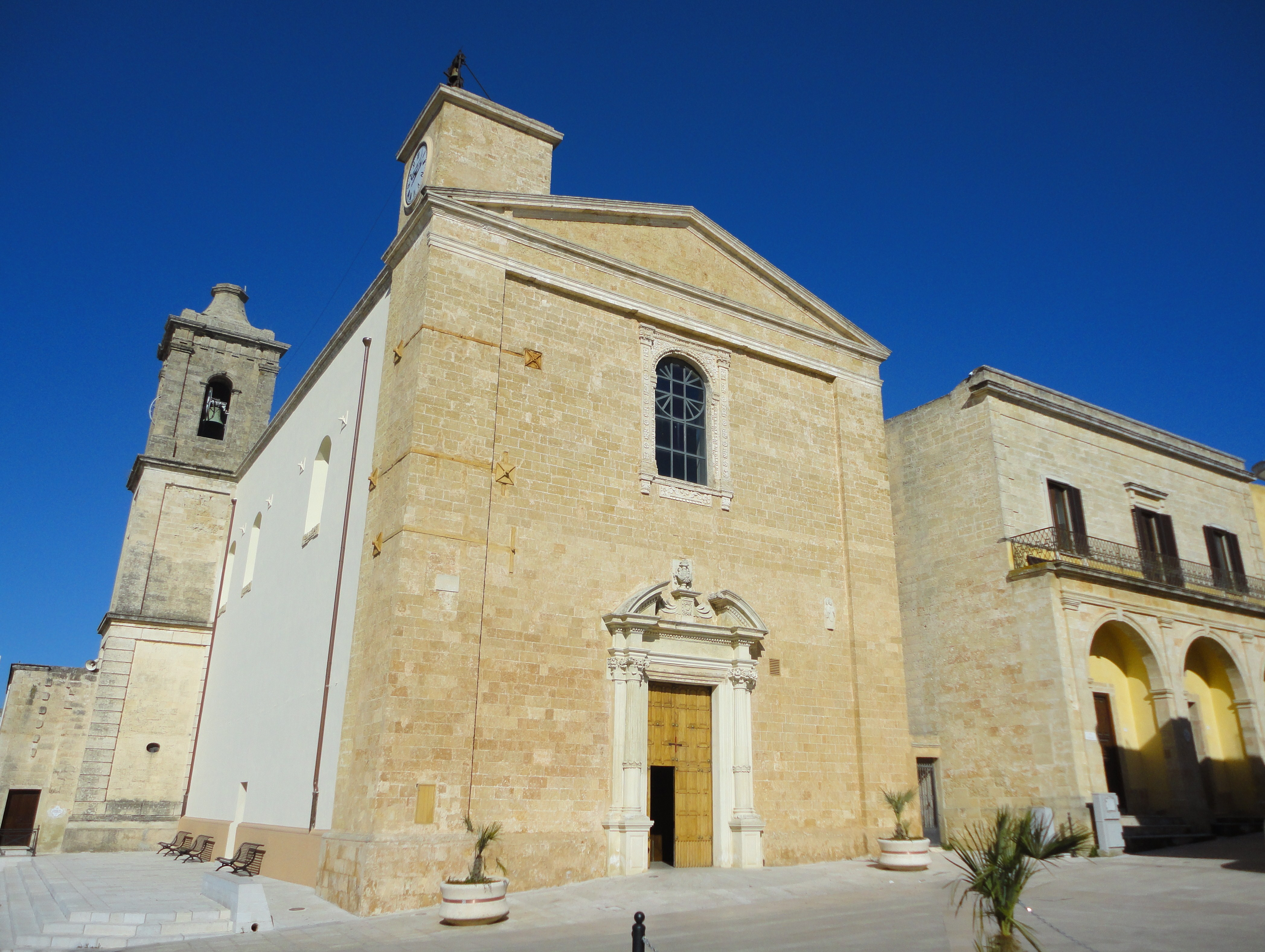 Chiesa di san Rocco Confessore Gagliano del Capo